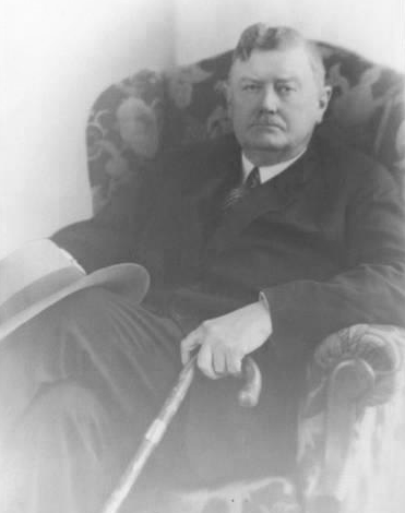 Bild des Malers Brynolf Wennerberg, um 1920